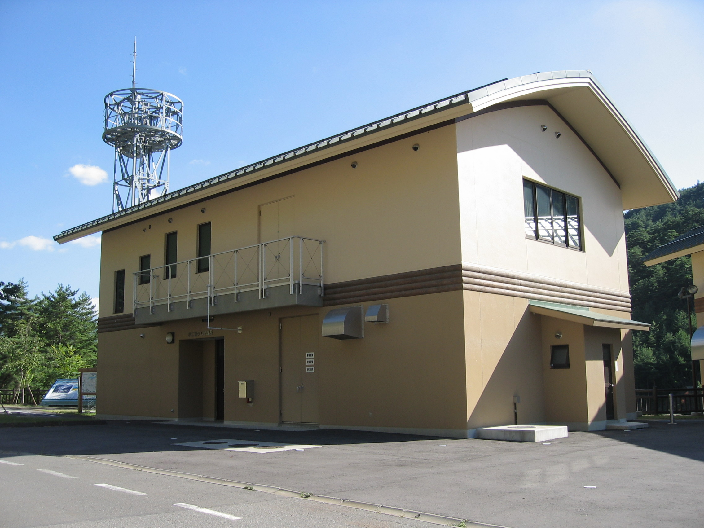 Onikuma Dam (小仁熊ダム) is a dam in Nagano, Japan.